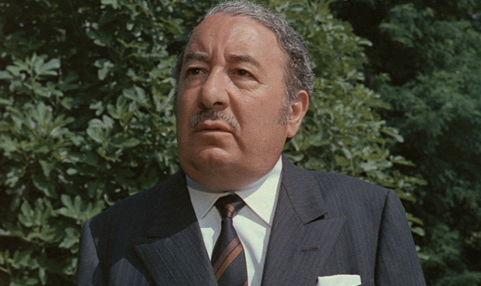 Fotogramma dal film La pecora nera (1968) catturato personalmente